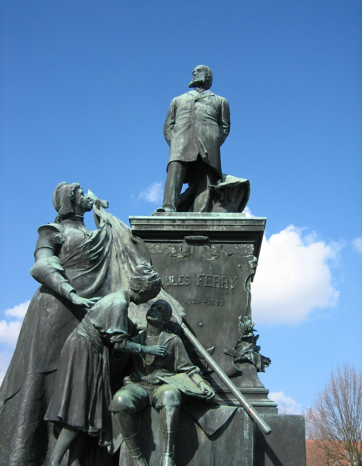 Statue de Jules Ferry à Saint-Dié-des-Vosges (88100) France